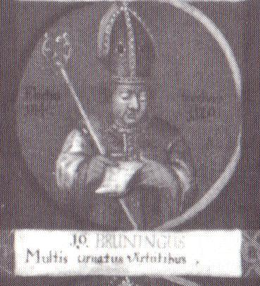 Bruning